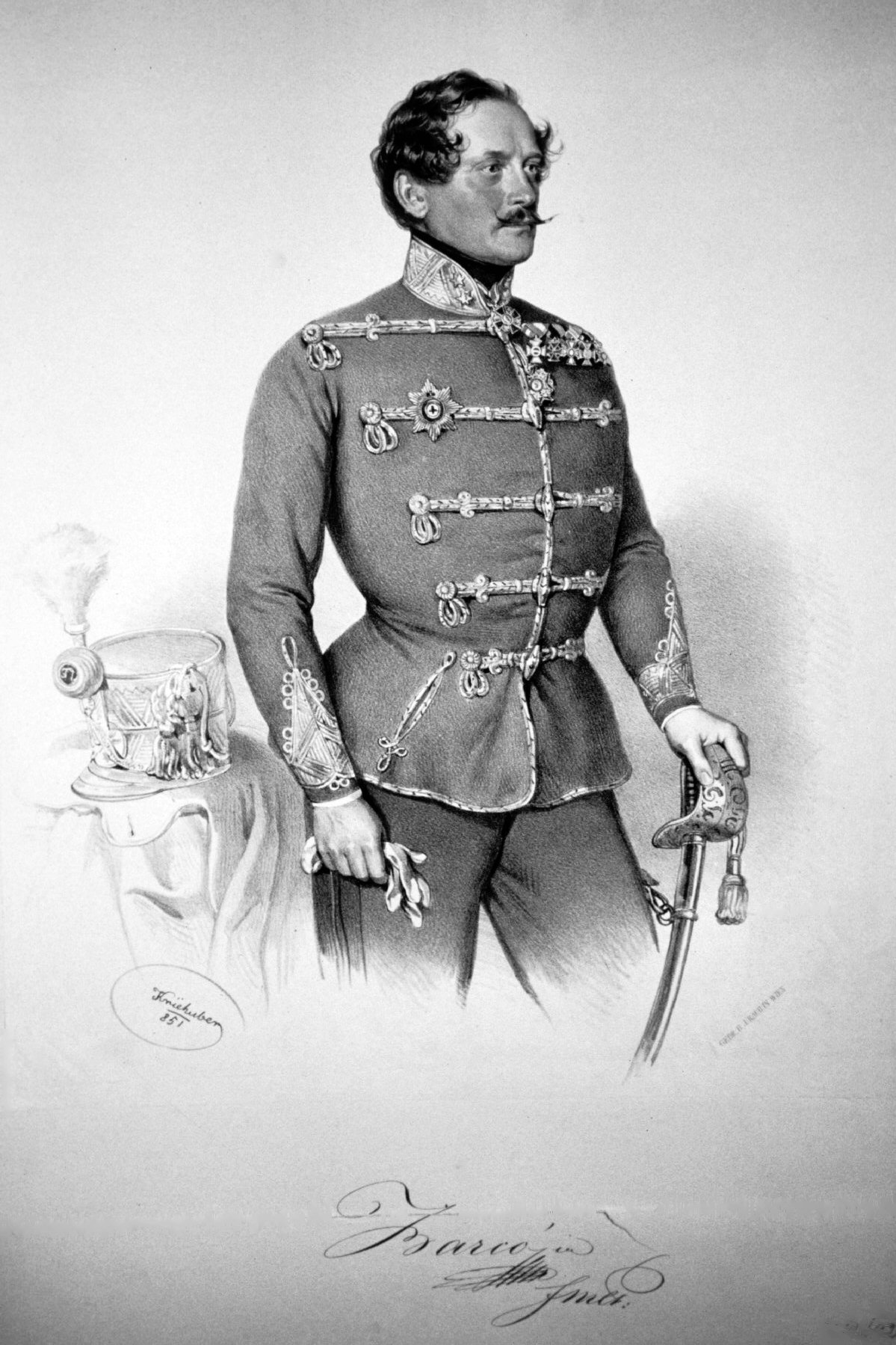 Josef von Barco (1798-1861), Feldmarschallleutnant, Oberleutnant der Arcieren-Garde, Ritter des Maria-Theresien-Ordens.